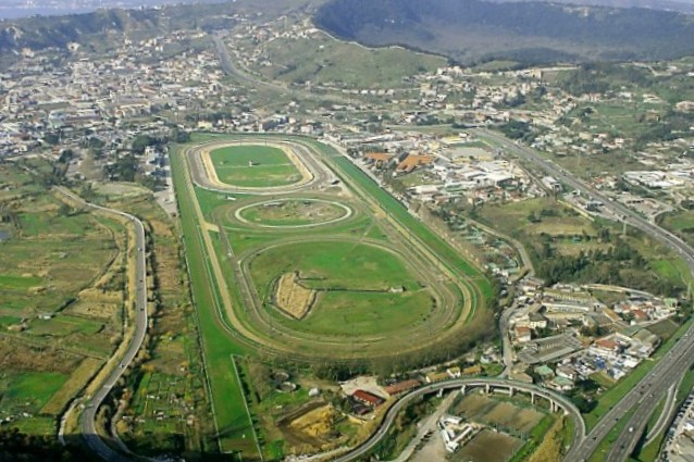 L'Ippodromo di Agnano in una veduta aerea